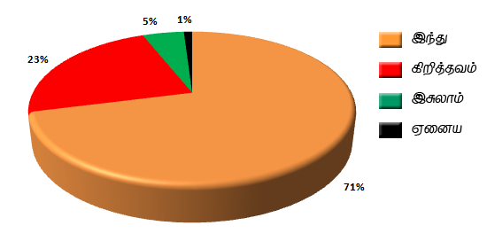 Religious composition of population in Batticaloa Municipality - 2008